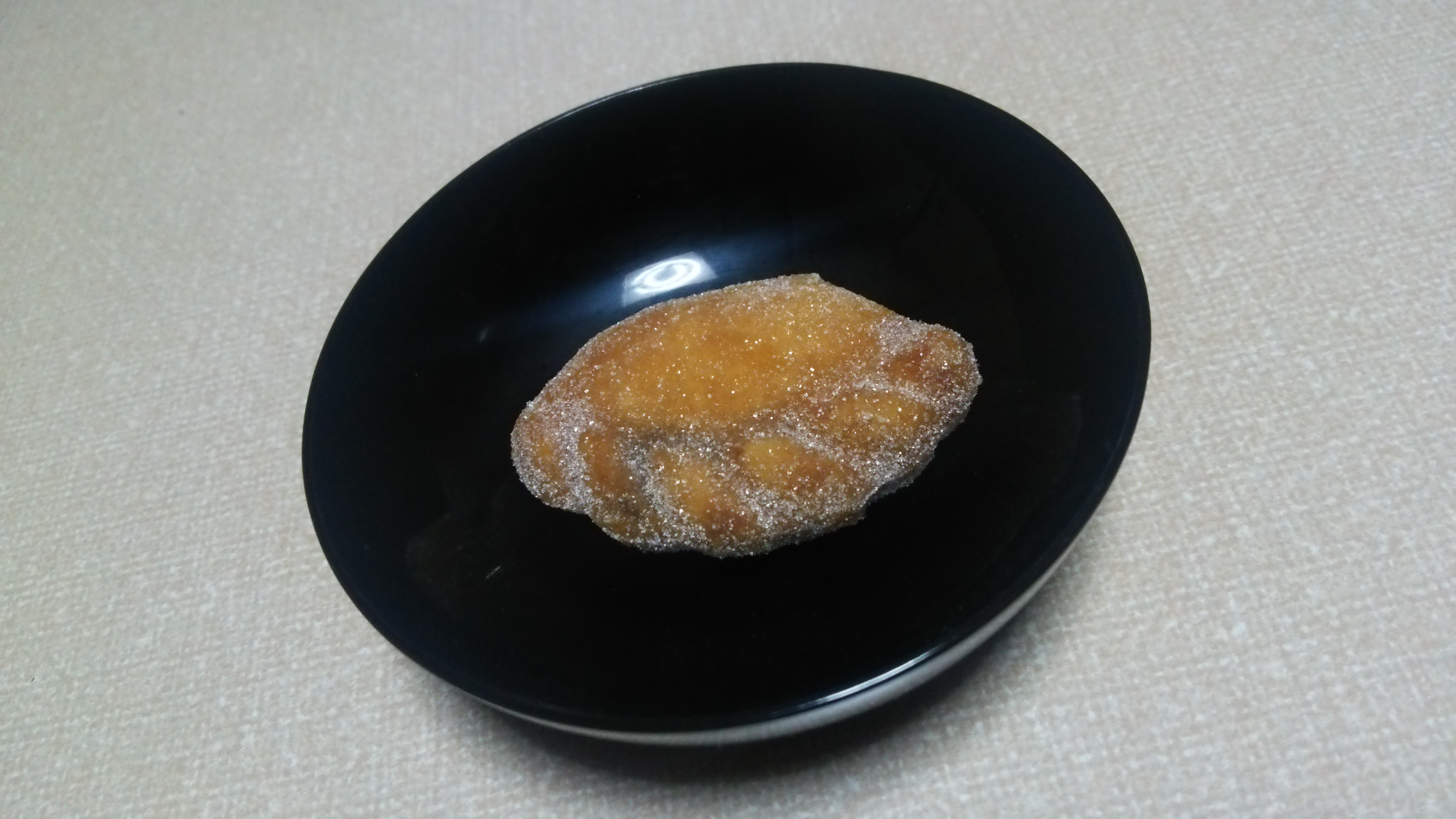 ぶと饅頭